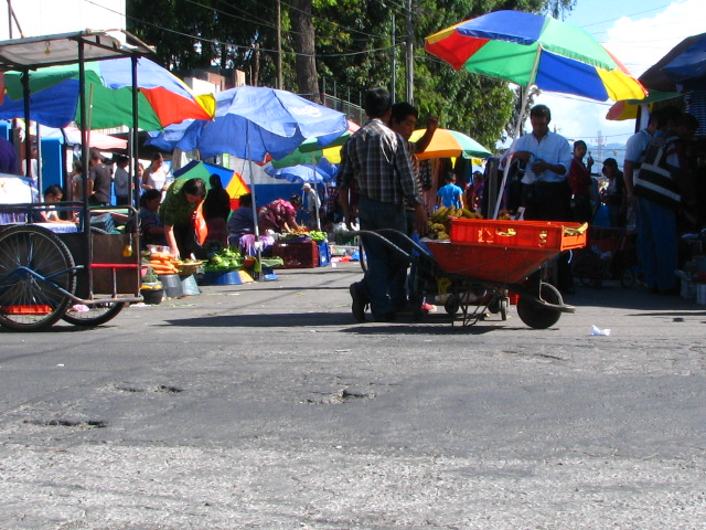 Mercado de la zona 7 de la ciudad de Guatemala